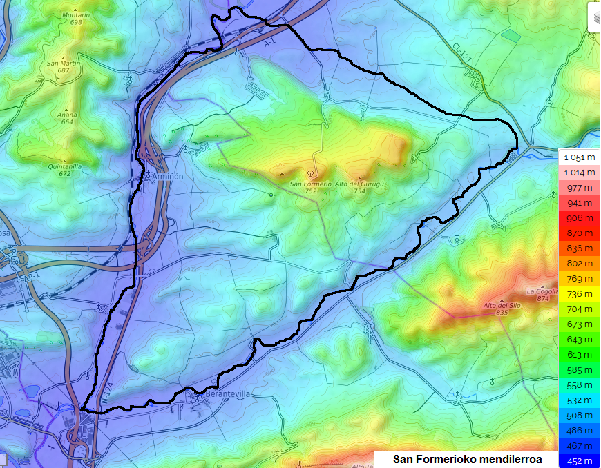 San Formerioko mendilerroaren mapa topografikoa.